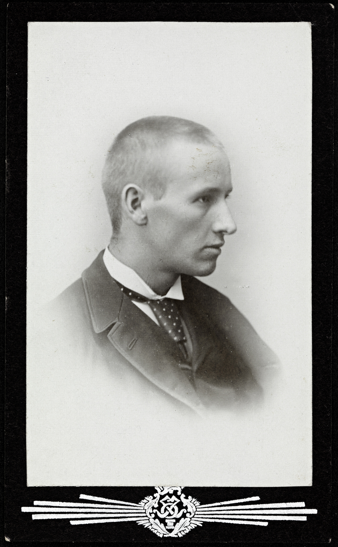 Tittel / Title: Portrett av Gustav Vigeland (1869-1943) Motiv / Motif: Visittkort. Dato / Date: ca 1891 Fotograf / Photographer: Johannes Olsen (Kjöbenhavn) Sted / Place: Danmark, København Eier / Owner Institution: Nasjonalbiblioteket / National Library of Norway Lenke / Link: Bildesignatur / Image Number: blds_04877